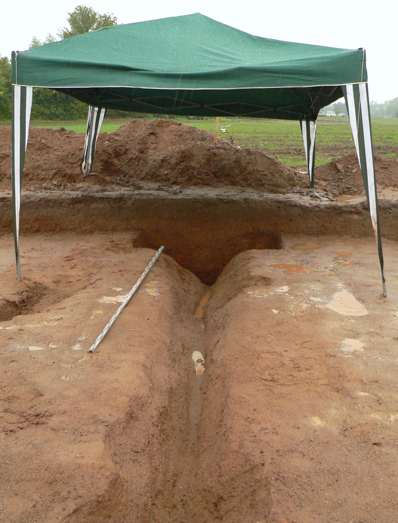 Grabungszelt an der Ausgrabungsstelle mit ausgelöffeltem Spitzgraben